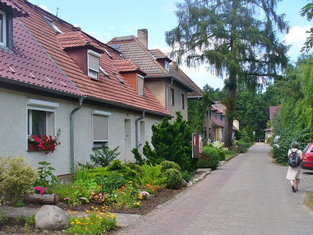 Gildenhall - Blumenstrasse